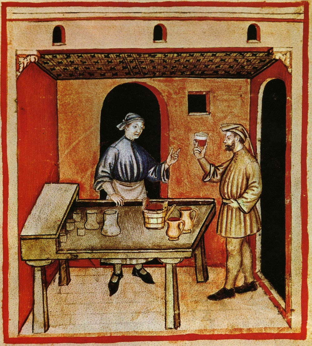 Alimenti: vino rosso, dal Taccuino Sanitatis, Manoscritto Casanatense 4182 (XIV secolo).